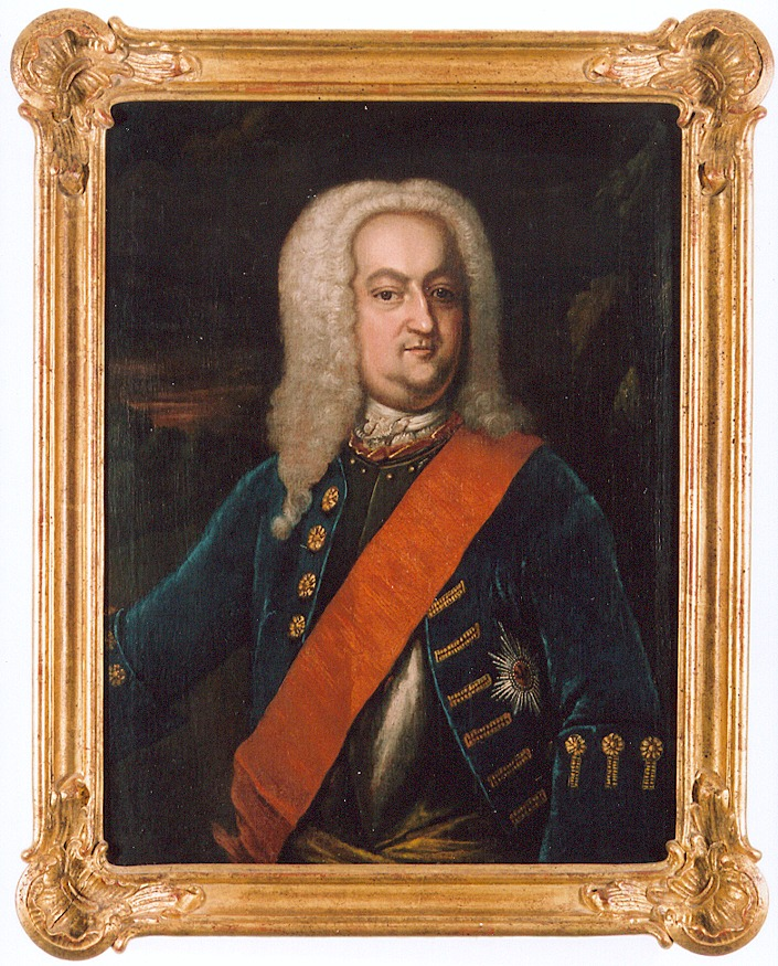 Hans Albrecht von Barfus (1635-1704)